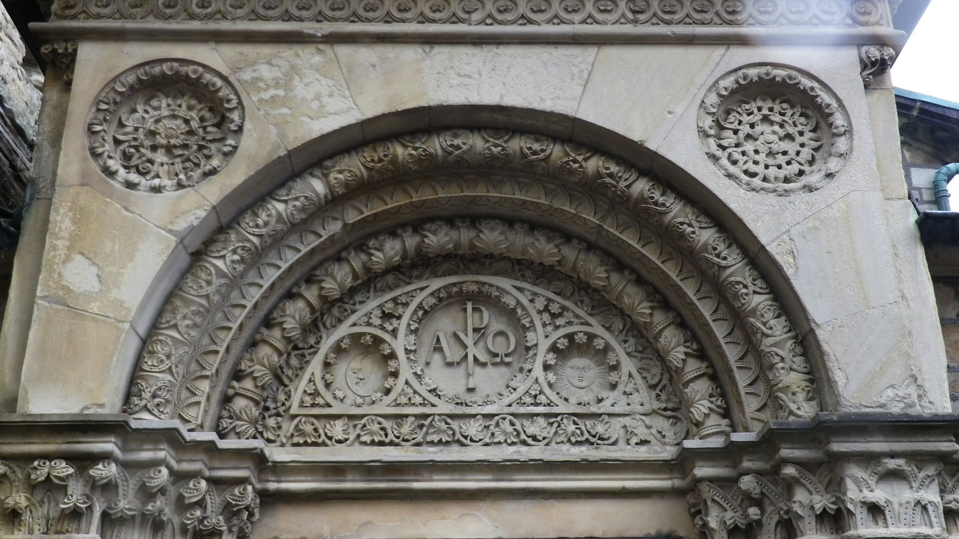 Detailansicht, Seiteneingang St. Mauritz-Kirche, Münster